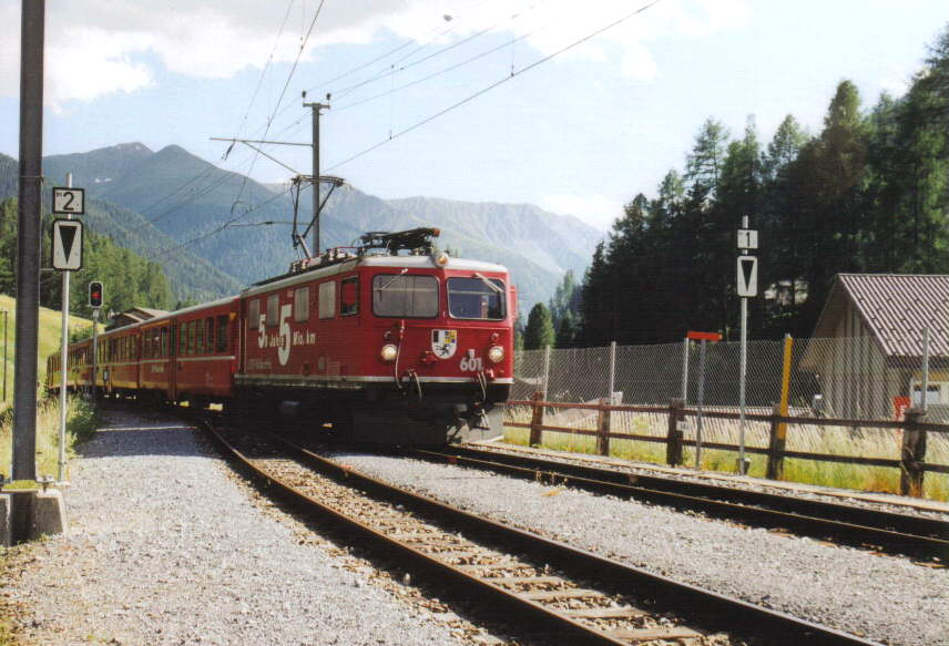 Die Ge 4/4 I 601 der Rhätischen Bahn am de:21. Juni de:2003 bei der Einfahrt in Davos-Glaris. Der Anstrich 50 Jahre 5 Mio. km weist auf die großartige Leistung der hier aus Richtung Filisur kommenden Elektrolokomotive hin. Aufnahme: Steffen Mokosch Lizenz: GNU FDL